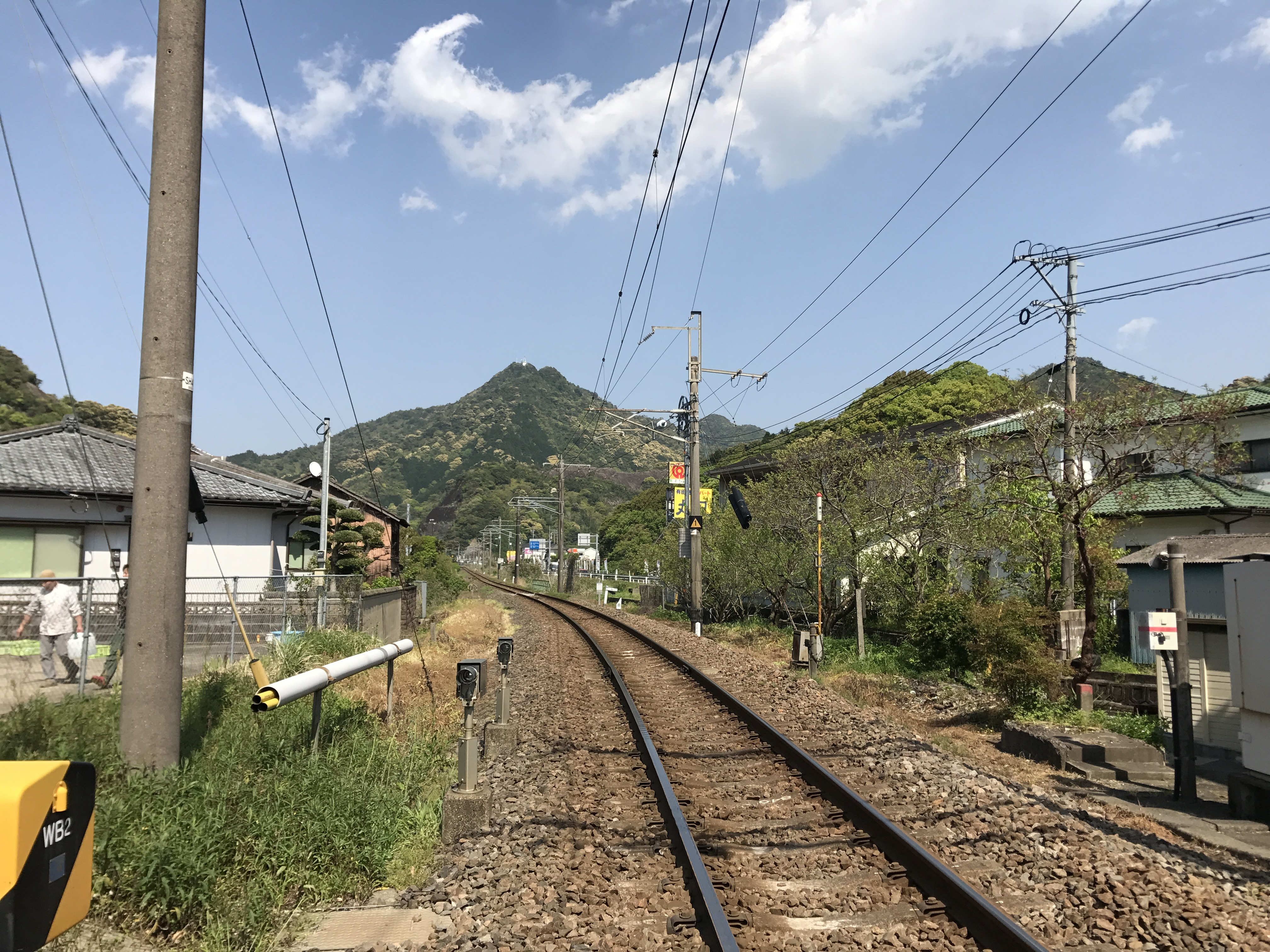 岩崎踏切より望む佐世保線上有田方面